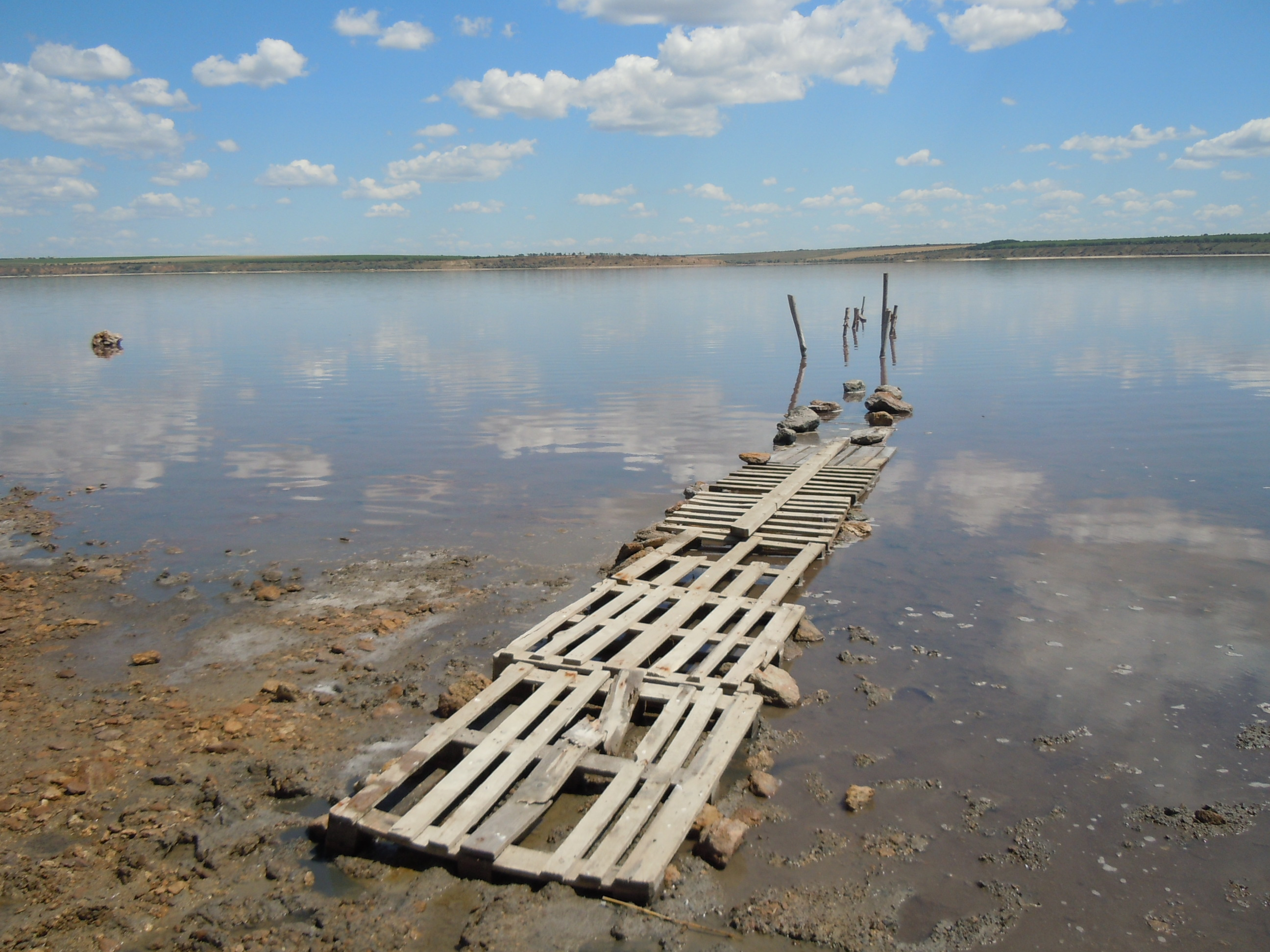 Куяльницький лиман біля села Августовки